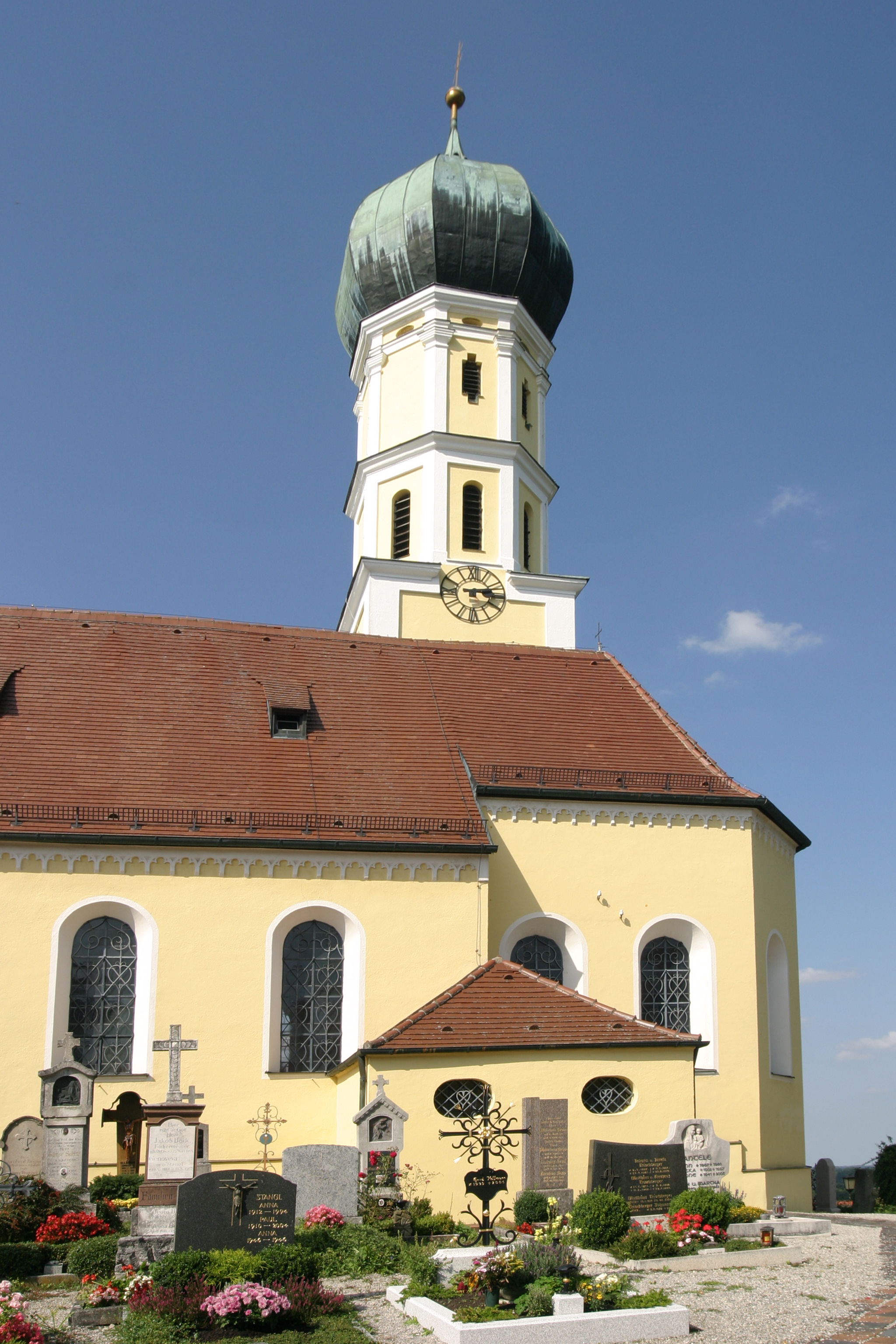 Die Sankt Anna Kirche in Schondorf, Ortsteil Oberschondorf, mit umgebenden Friedhof.